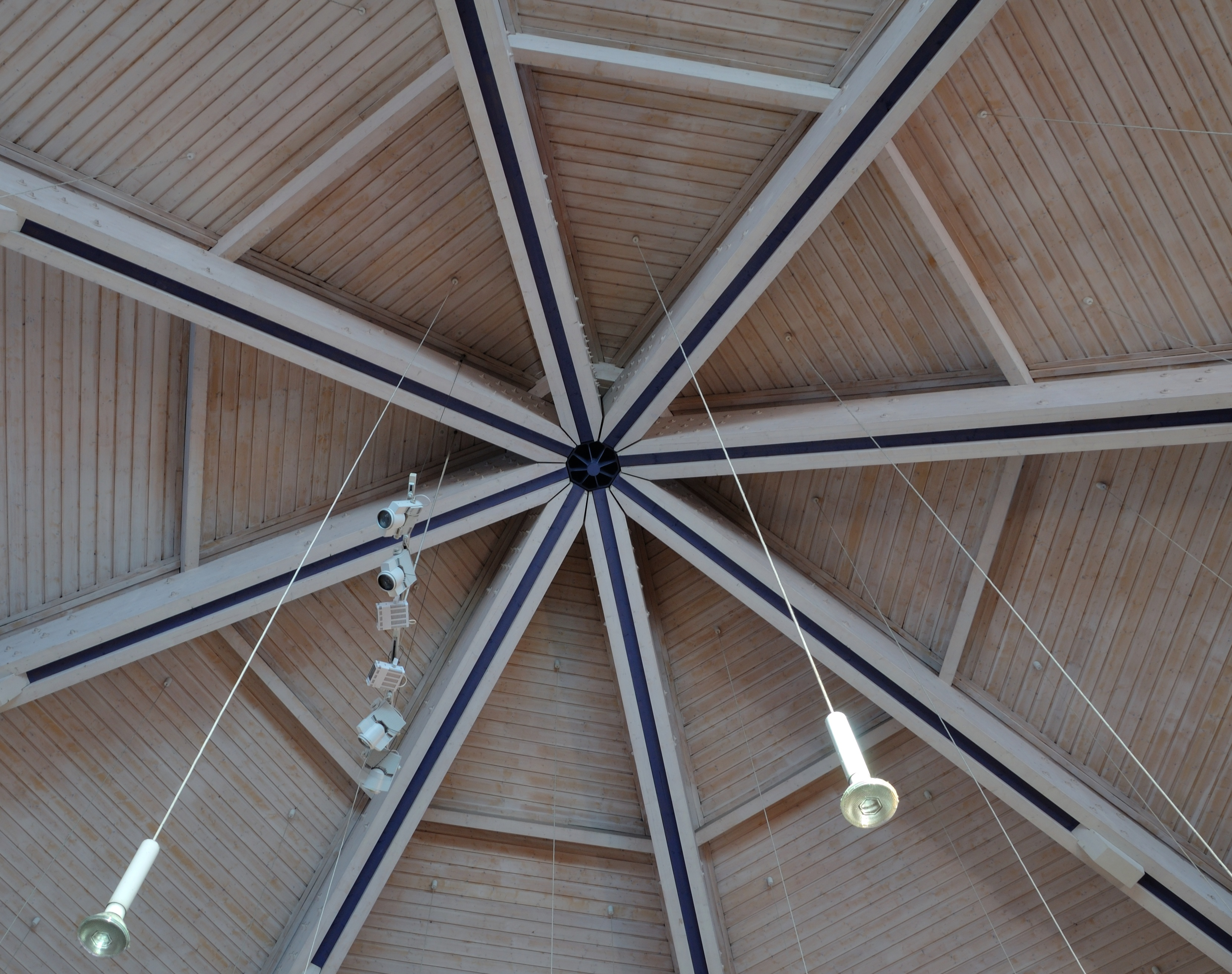 Weil am Rhein: Peter-und-Paul-Kirche (Innenansicht der Spitze des Zeltdachs)